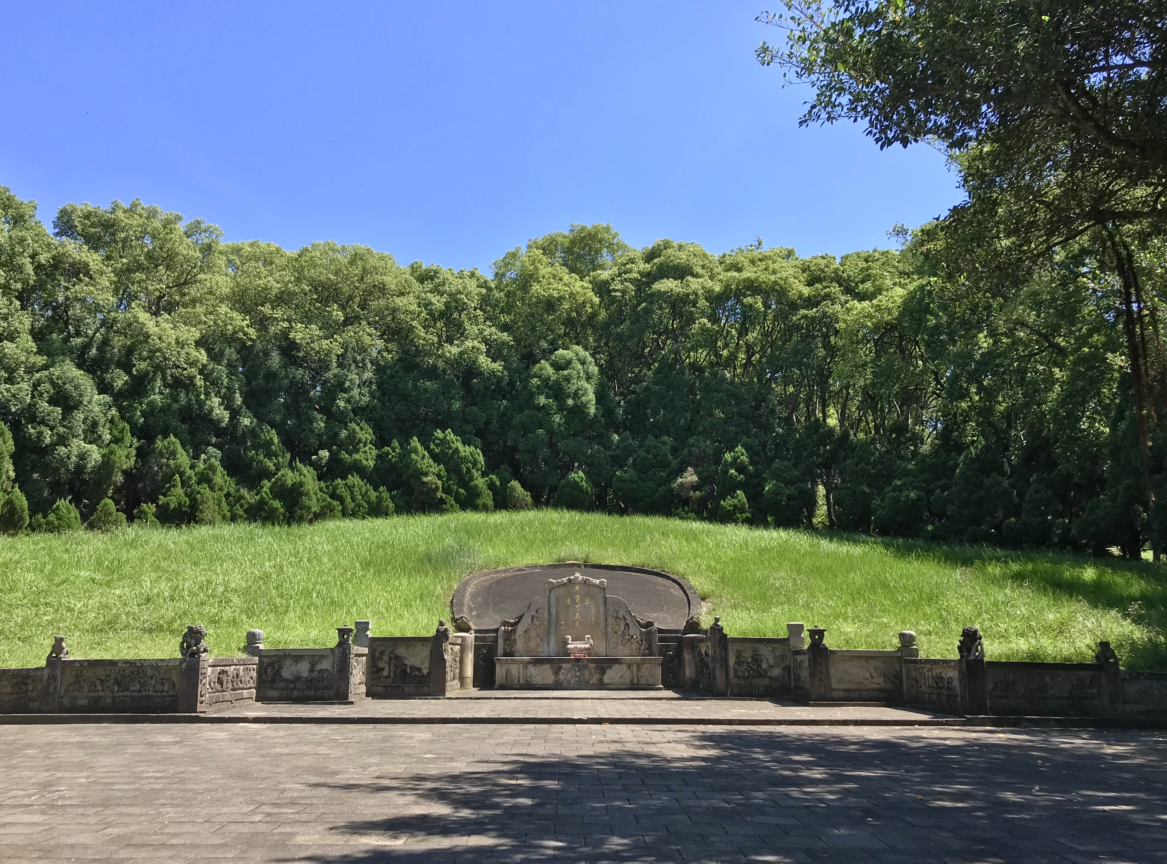 褒忠亭義民廟義民塚